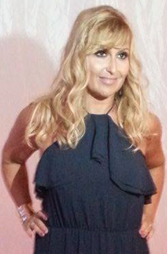 Polska aktorka Katarzyna Skrzynecka w sierpniu 2016 roku.